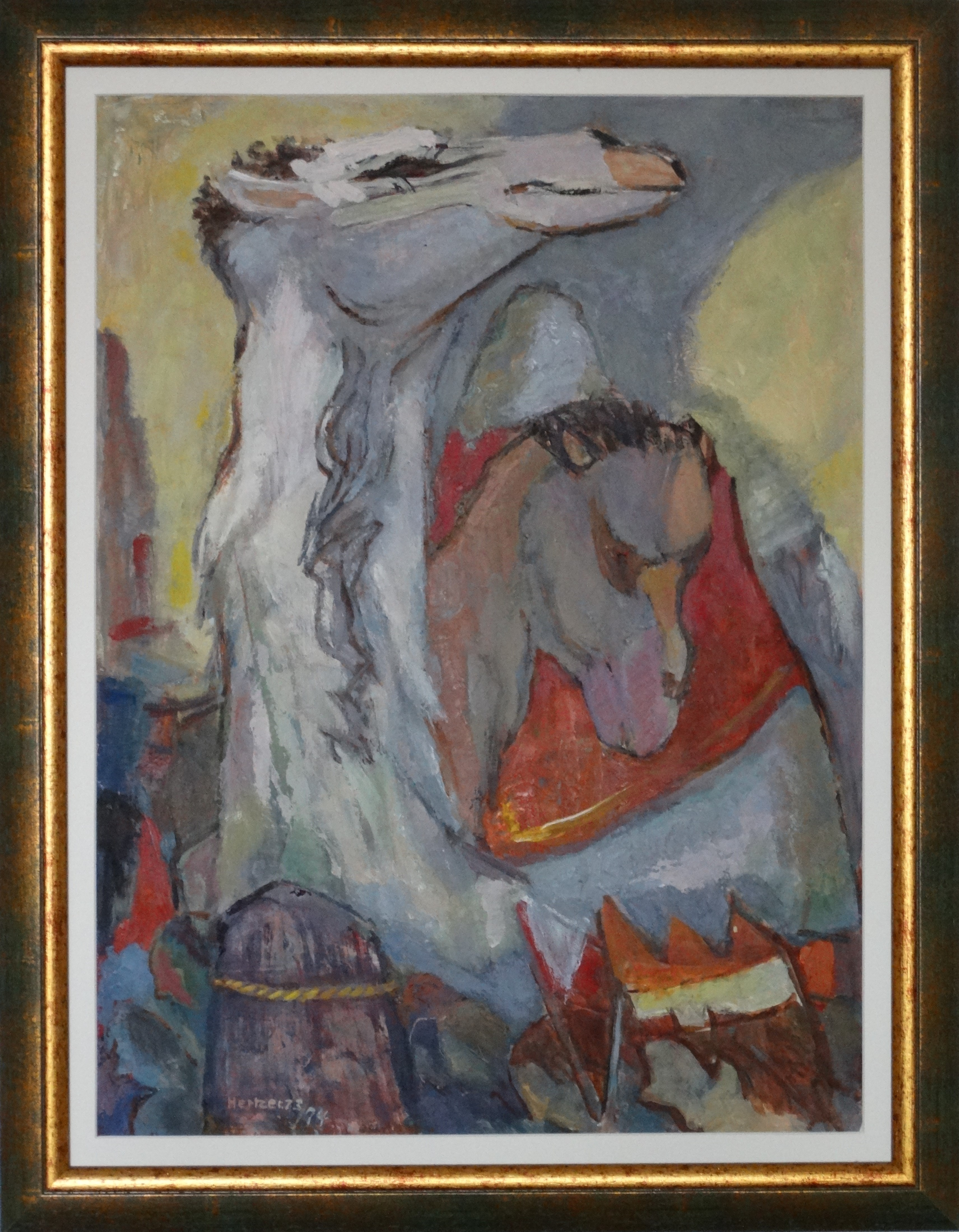 Öl-Bild "Weißes Kamel" von Else Hertzer, signiert und mit 1974 datiert